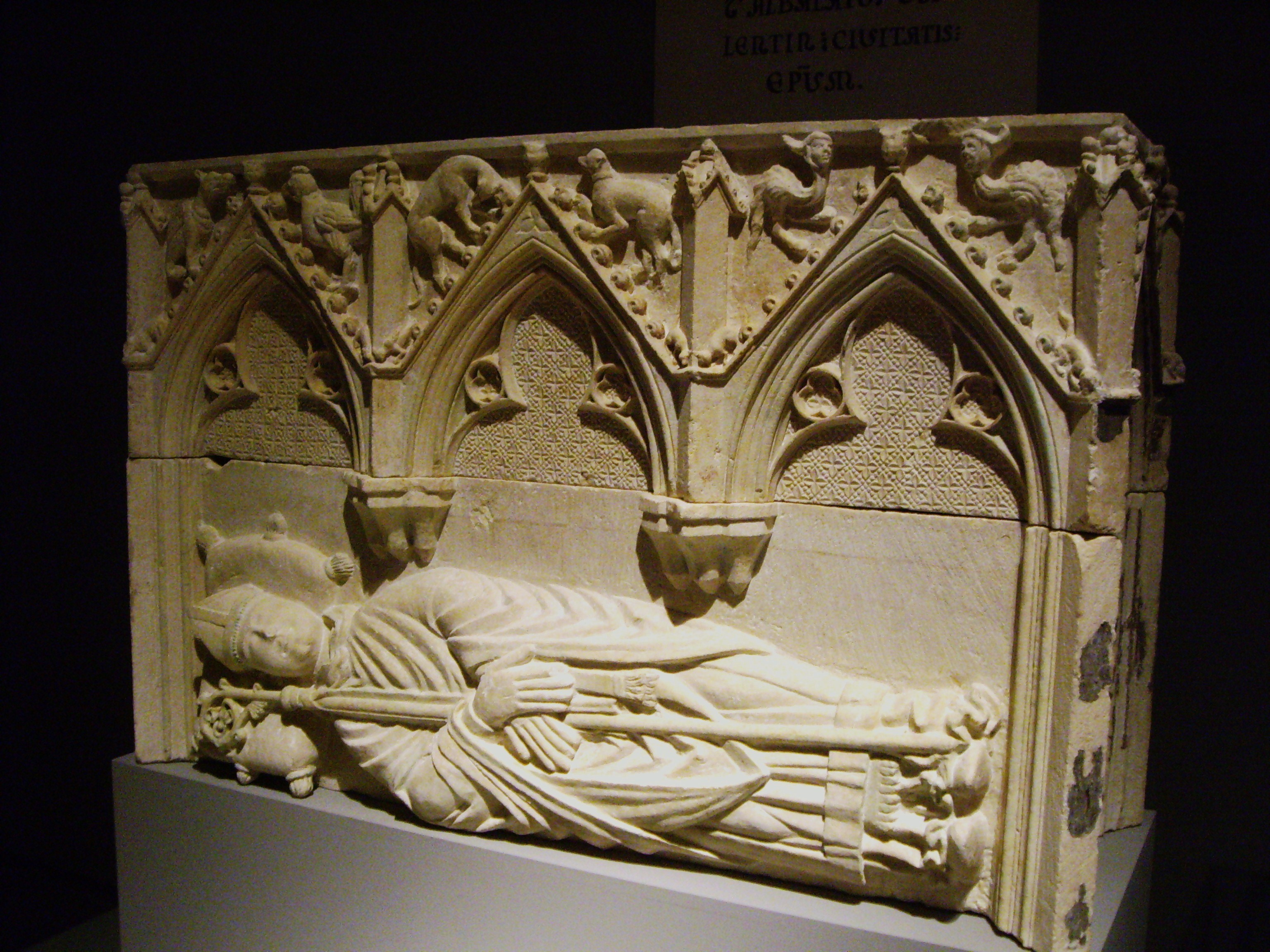 Sepulcre del que fou tercer bisbe de valència (entre 1248 i 1276) i qui va col·locar la primera pedra de la catedral de València. Del segle XIII, gòtic, el sepulcre es redescobrí l'any 2008 i actualment es troba a la capella de Sant jaume Apòstol de la catedral de València.